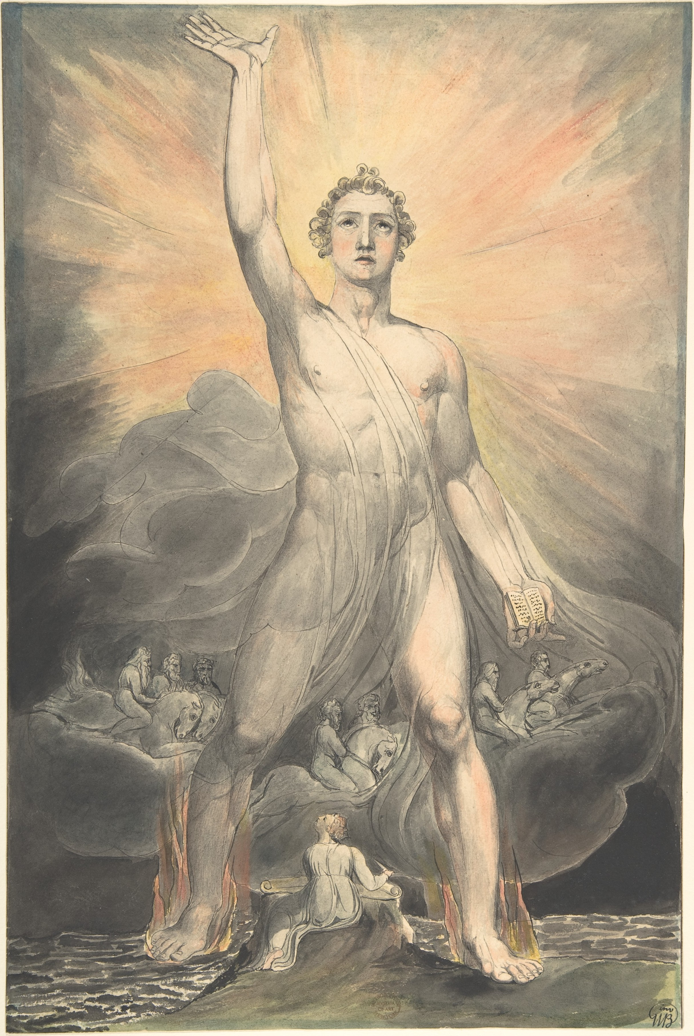 Drawing; Drawings